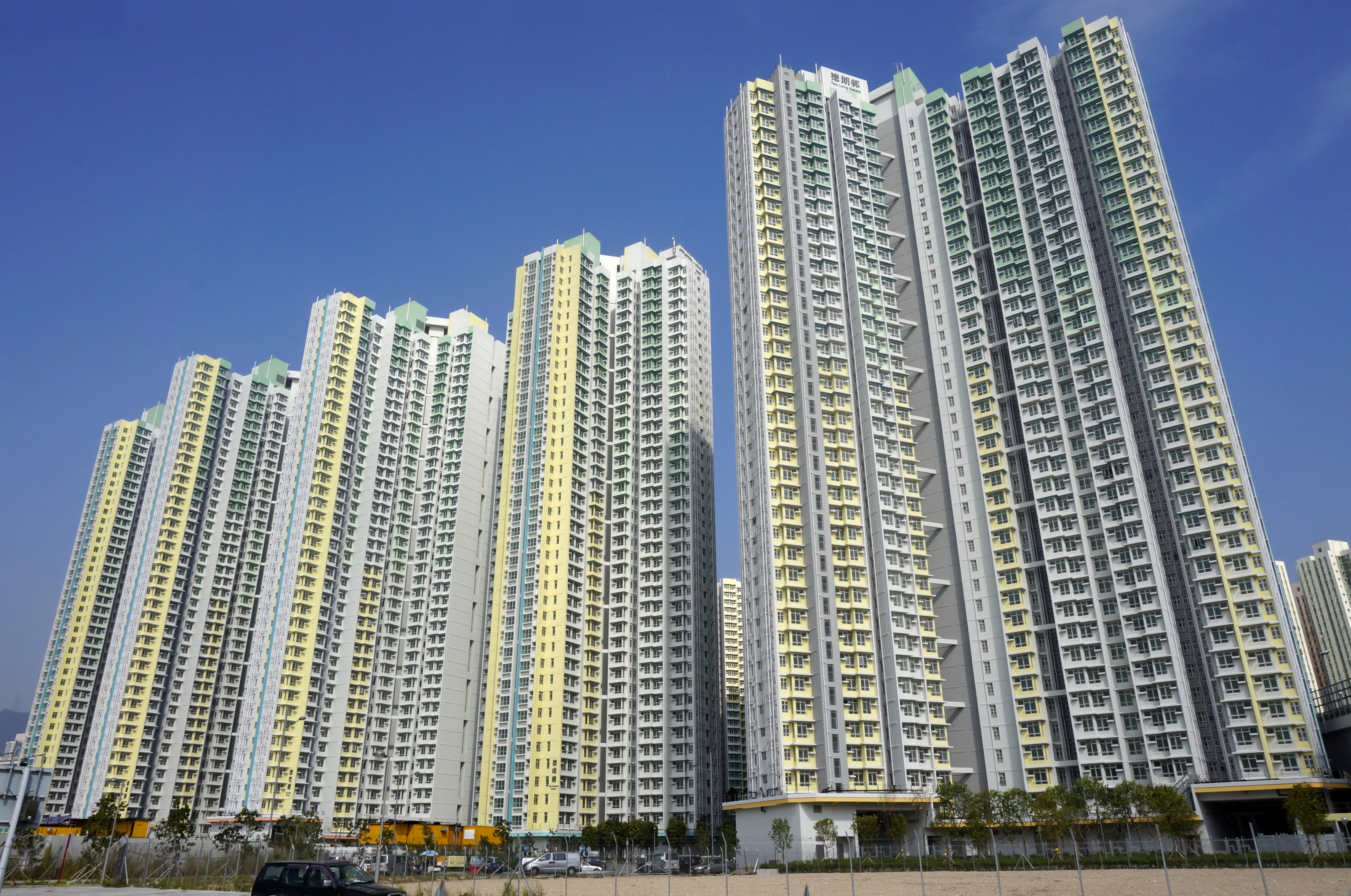 德朗邨各座大廈